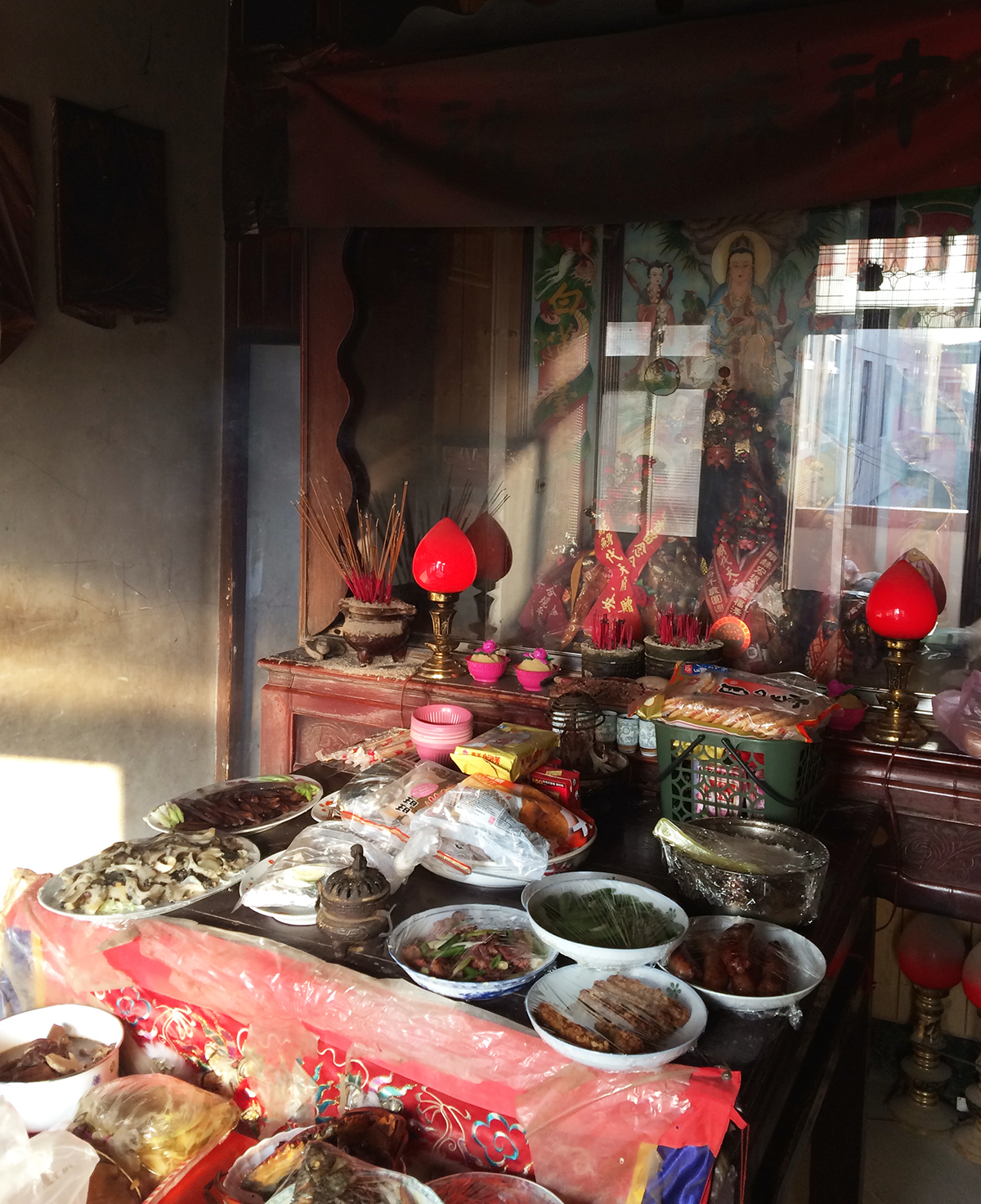 廿九暝為全年的歲末、除夕，臺語又稱、「二九暝」、「三十暝」、「過年暗」、客語稱「年三十暗晡」。今日需進行辭年儀式，寓意「告辭舊年」並緬懷神佛與祖先一年來的庇佑之意。所有親族無論身處何方，皆需返回原鄉與家族團聚。實際上辭年儀式細分為祭拜佛祖、神明、地基主、門神與祖先等階段，祭祀對象不同，供品亦小異。